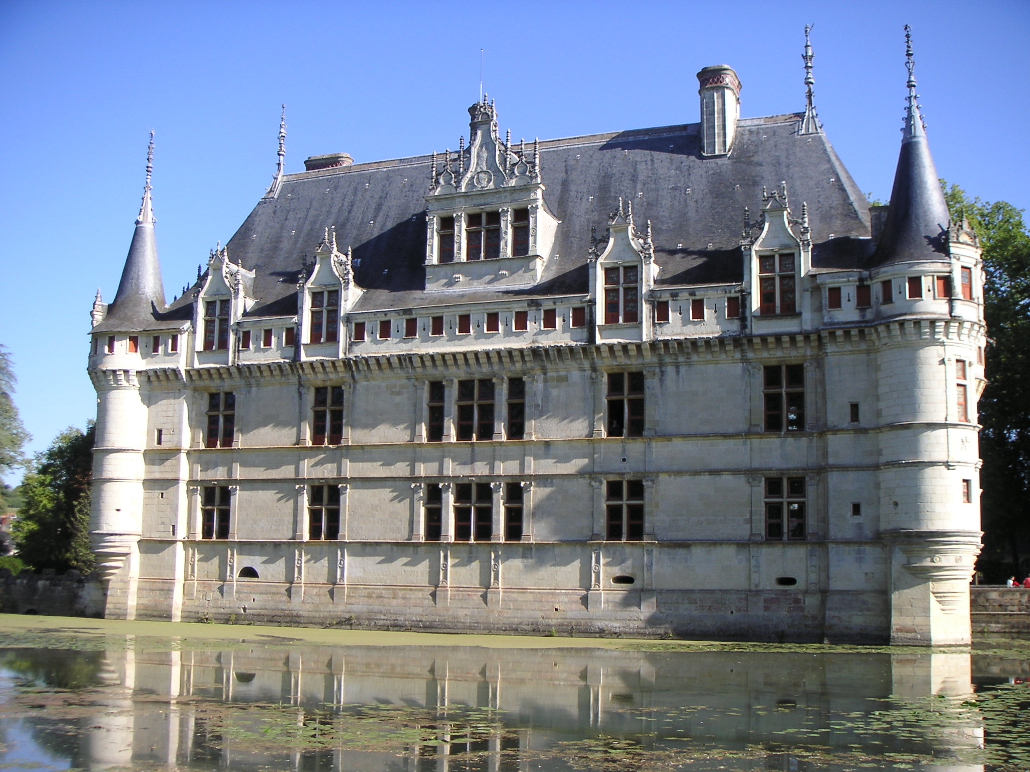 Vue du château d'Azay-le-rideau par le jardin.